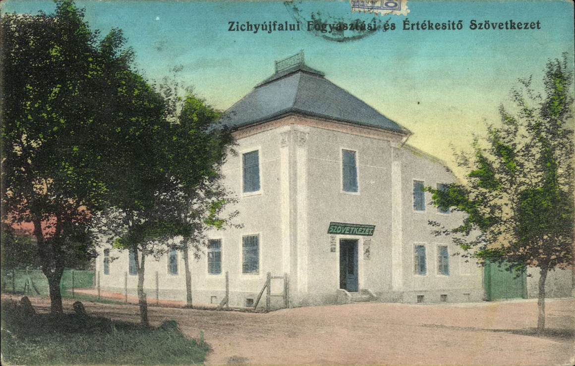 Zichyújfalu – Fogyasztási és értékesítő szövetkezet